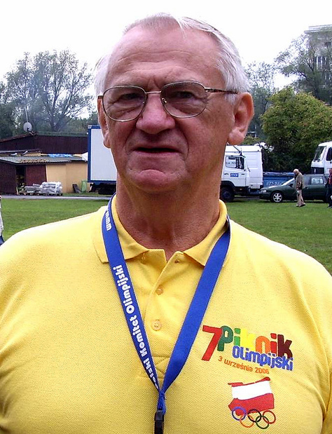 Zbigniew Pietrzykowski